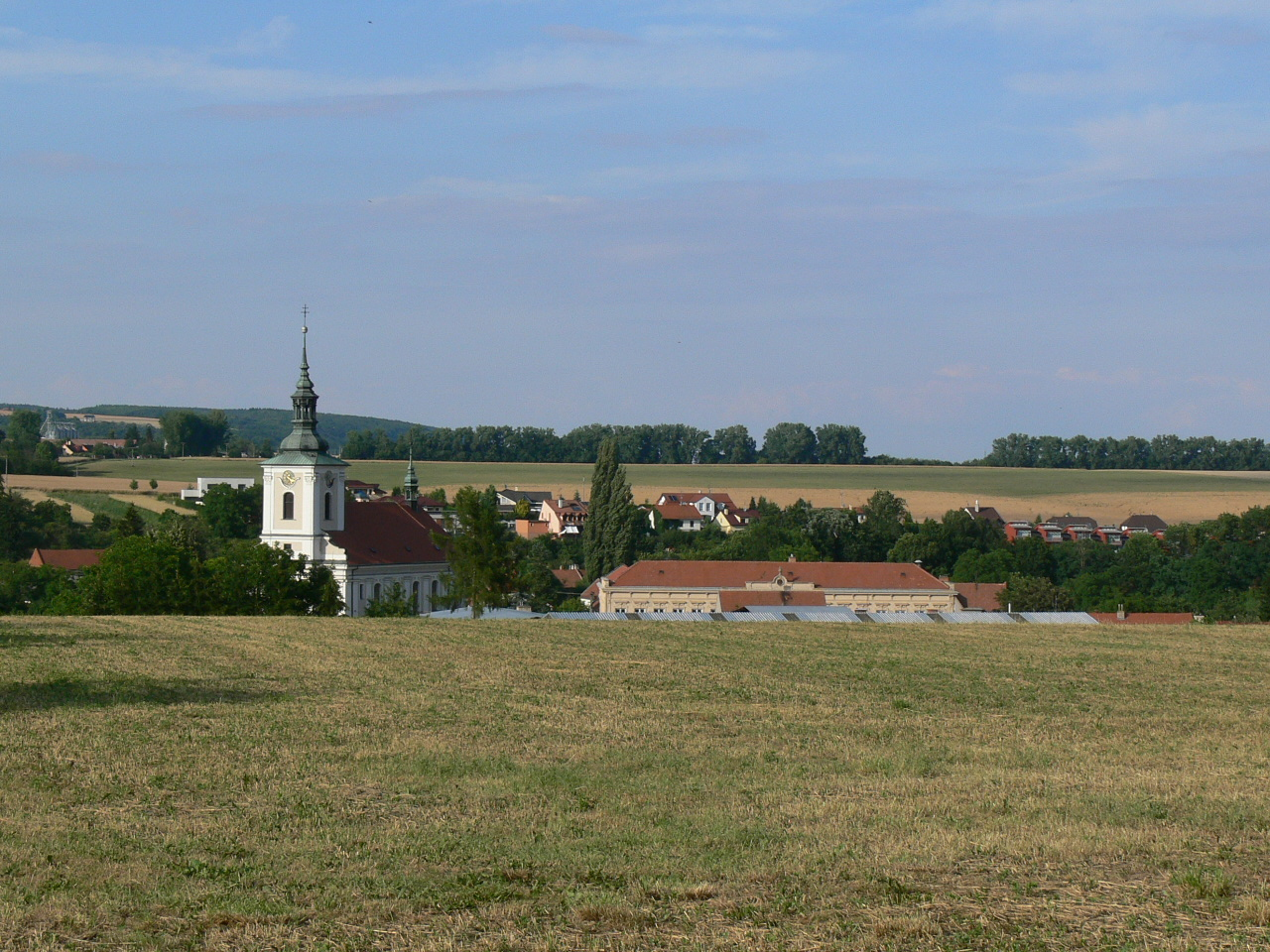 Dědice, kostel, střední zdravotnická škola